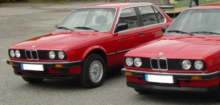 2 zinnoberrote E30-Limousinen, jeweils 318i, 4-türig, links Baujahre bis August 1985, rechts ab September 1985 bis August 1987